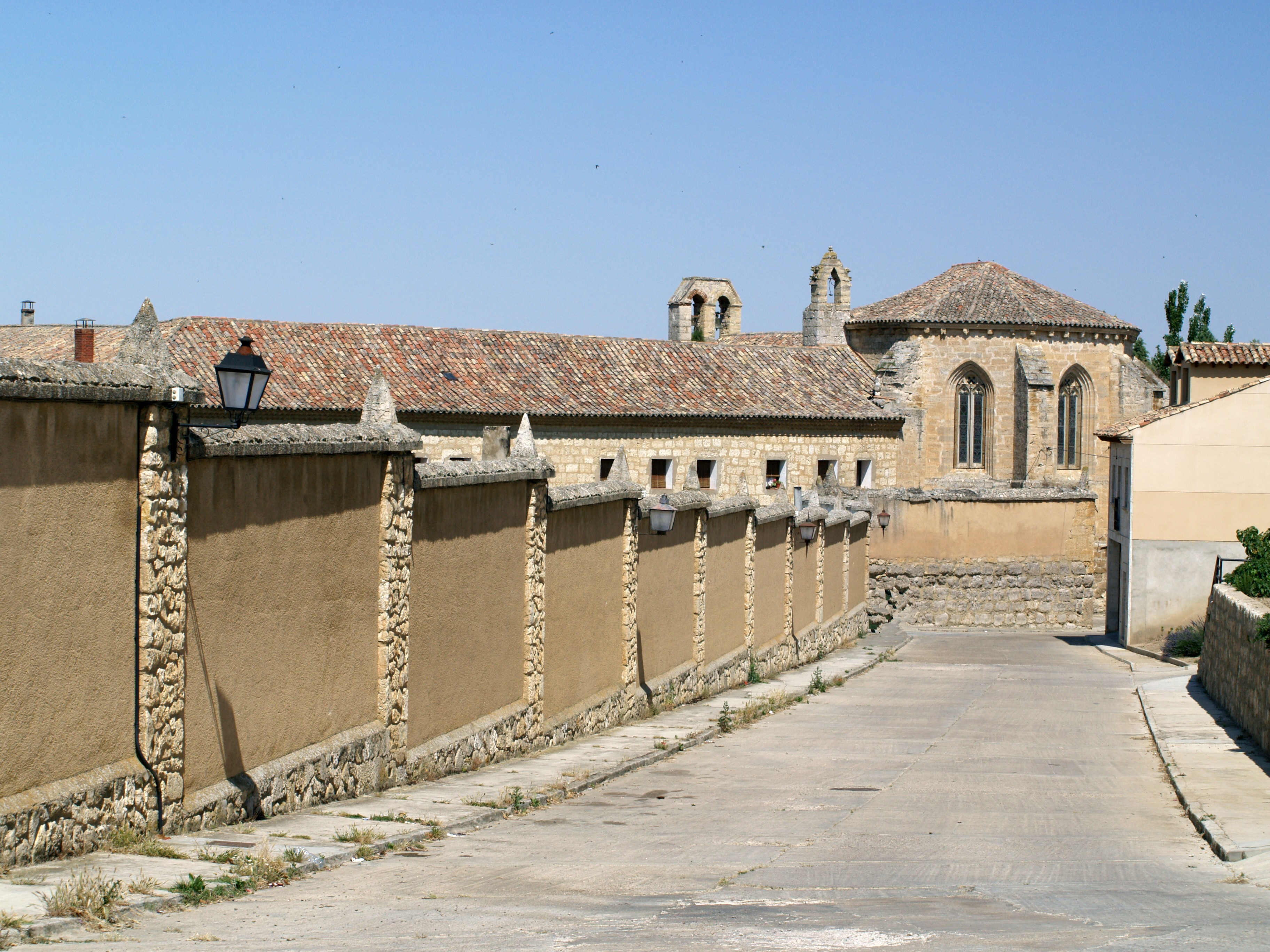 Covento Claras